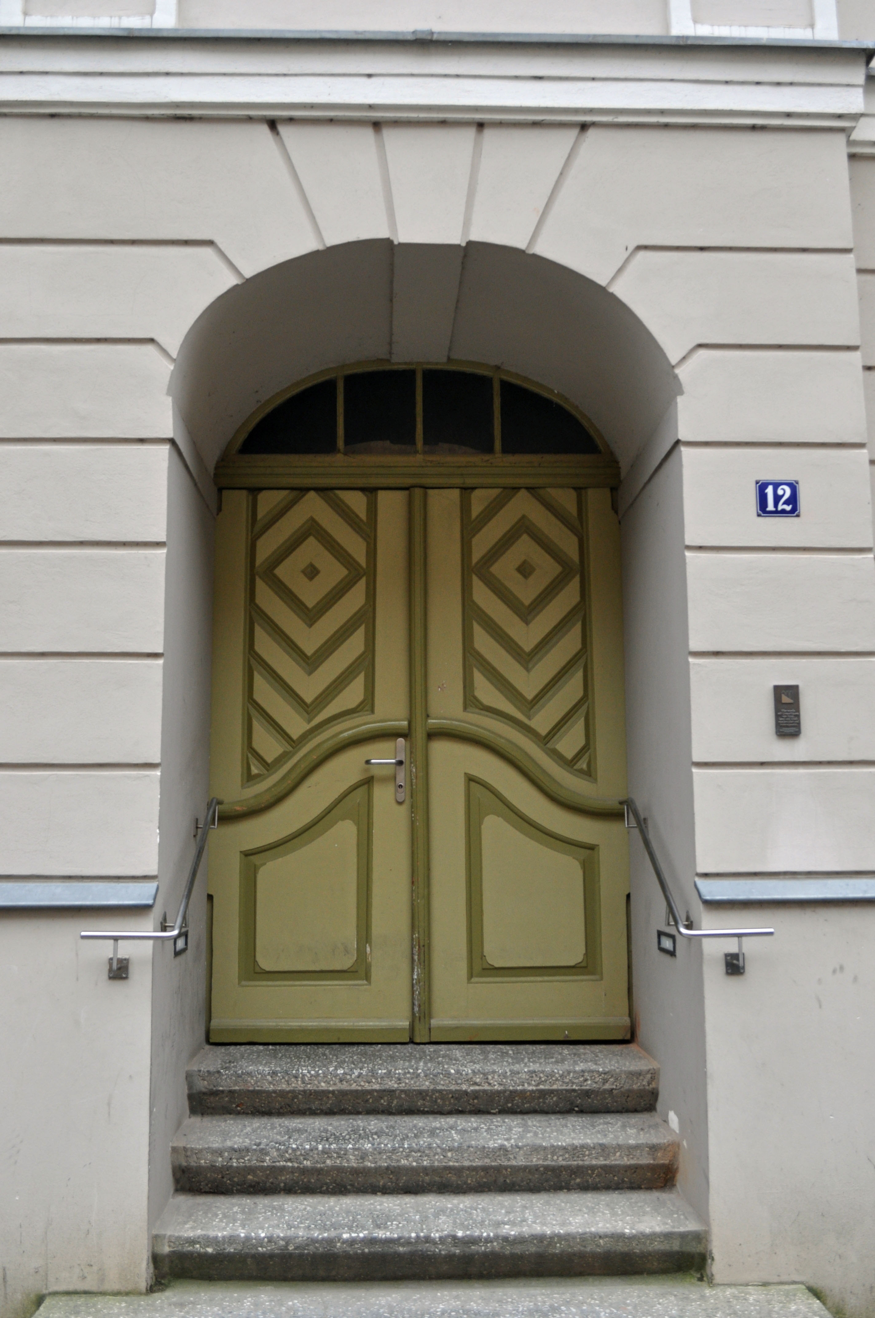 Gebäude bzw. Gebäudedetail in Stralsund. Straße und Hausnummer siehe Dateiname.